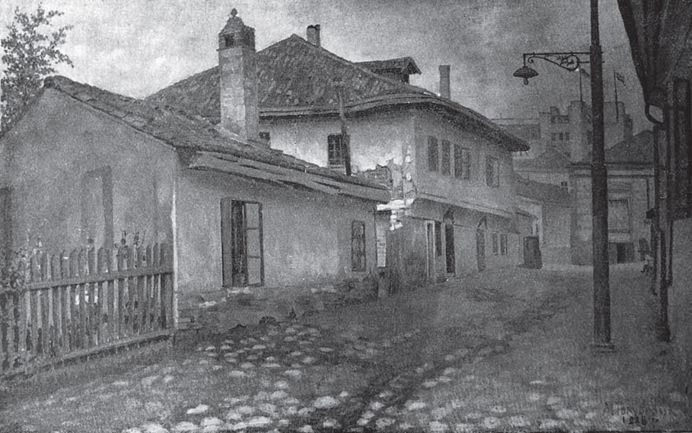 изглед из 1928.године, документација Завода